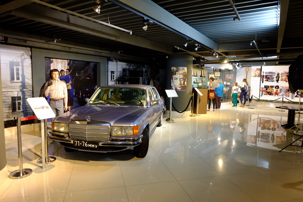 Музей Высоцкого в Екатеринбурге